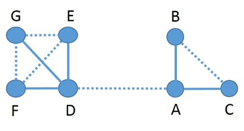 Vahvat ja heikot siteet (mukautettu Granovetter, 1973)